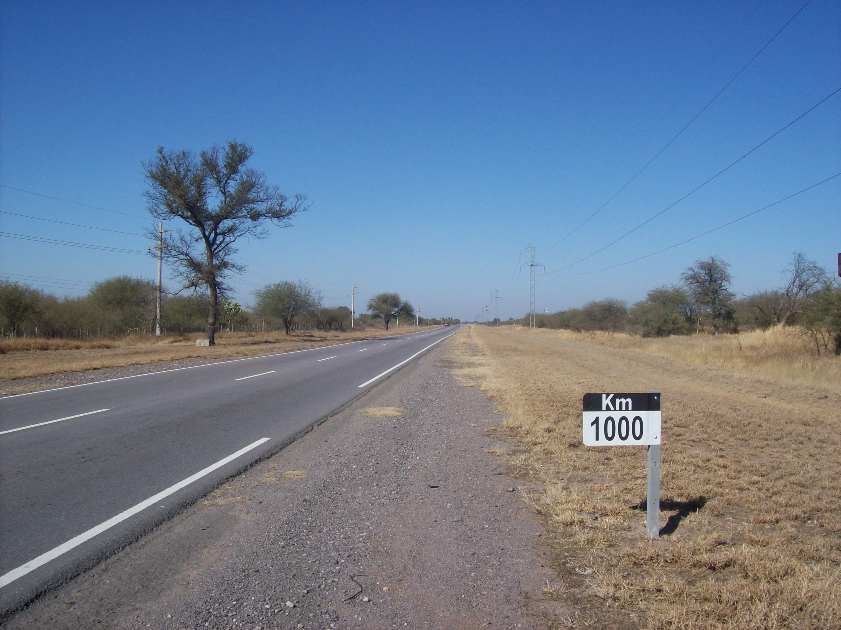 km 1000 de la Ruta nacional 157 junto al Embarcadero km 1017 del Ferrocarril General Belgrano a 9 km al sur de San Antonio de La Paz, departamento La Paz, provincia de Catamarca, Argentina.